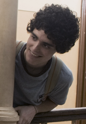 Eu não quero voltar sozinho (No quiero volver solo) es un cortometraje brasileño de 2010 dirigido por Daniel Ribeiro. Reparto Tess Amorim, Fabio Audi Fabio Audi